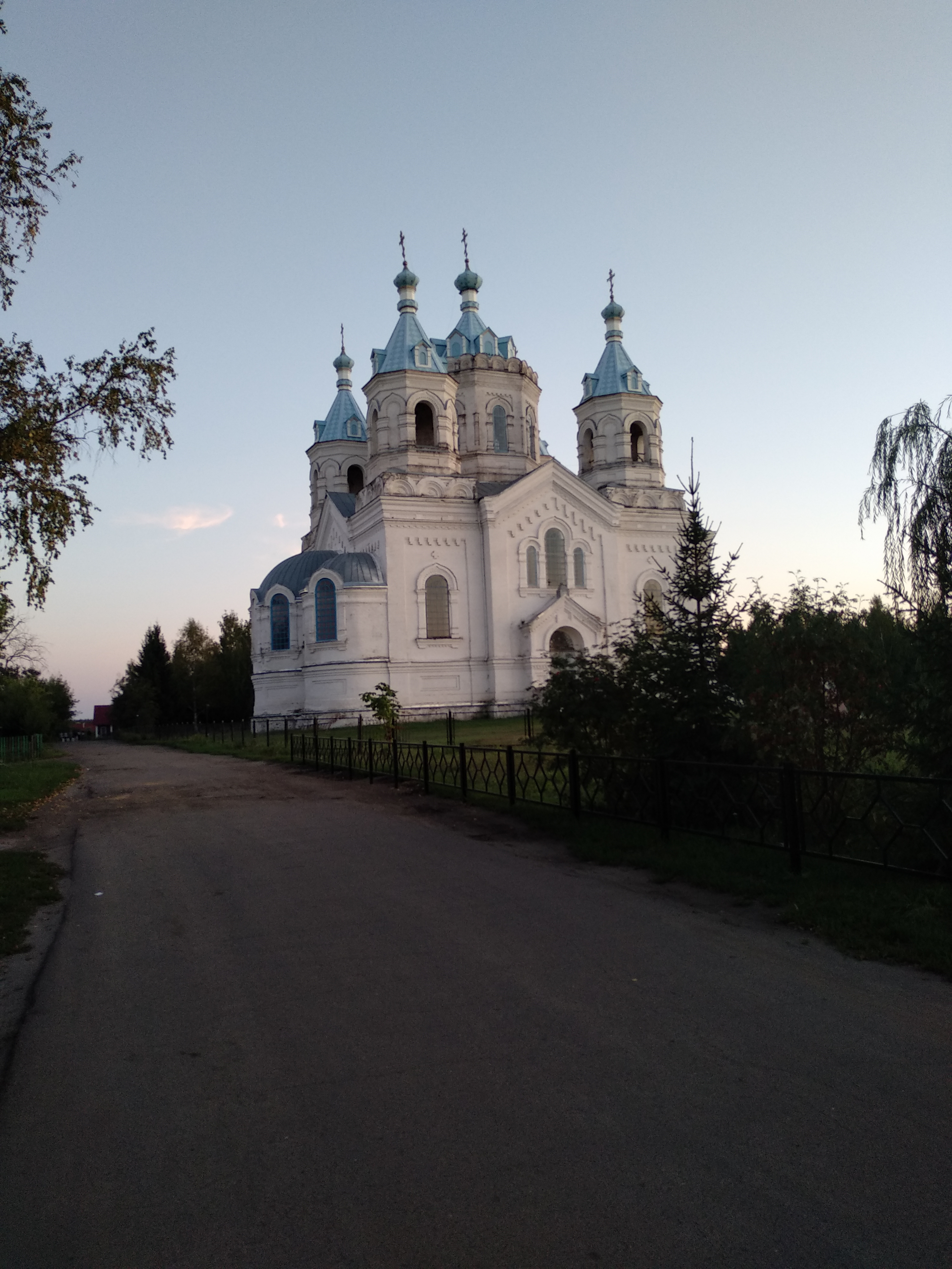 Церковь Богоявленская: Октябрьская улица, 4, Пахотный Угол, Бондарский район, Тамбовская область